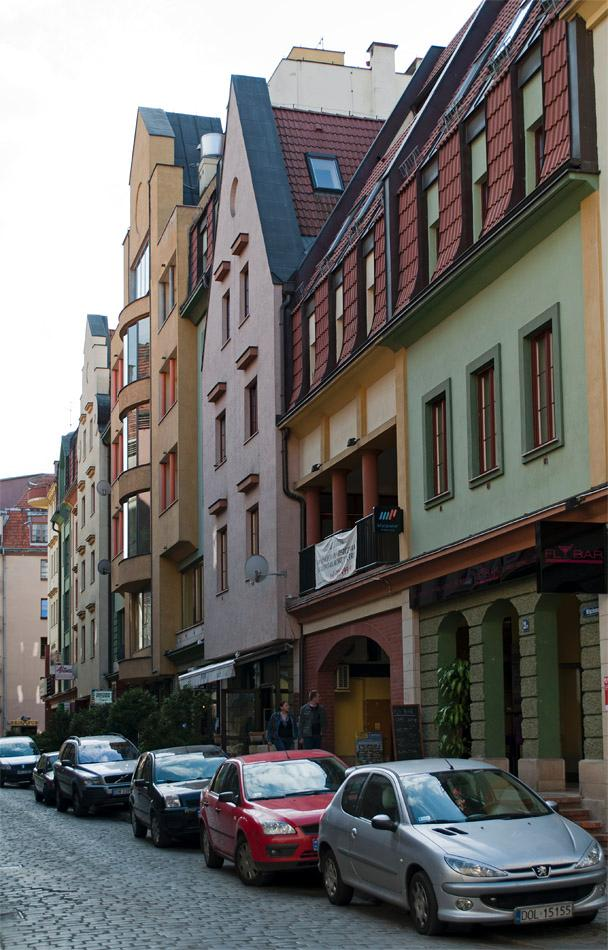 Współczesna zabudowa nawiązująca do przedwojennej.